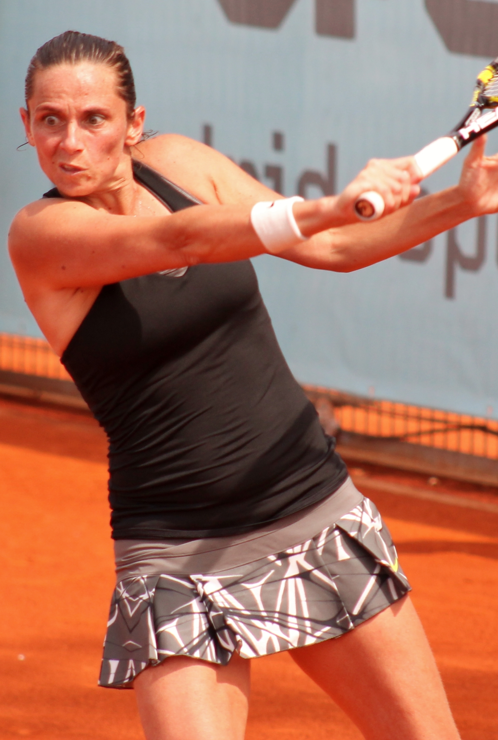 Vinci MA14 (12)